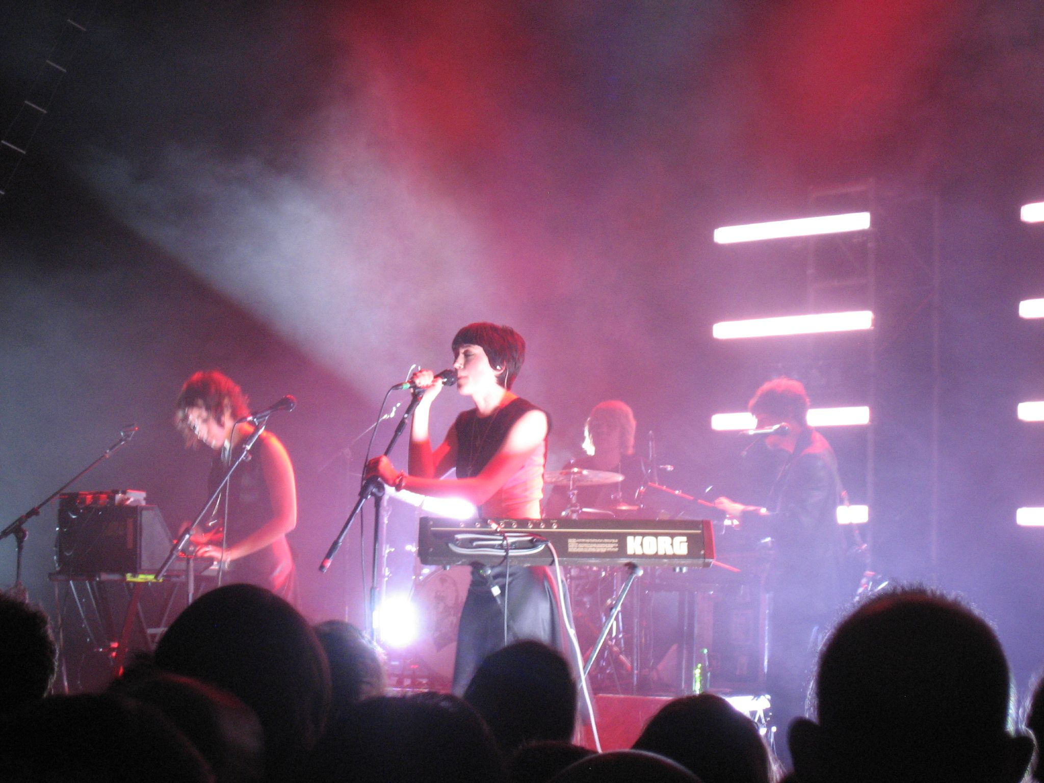 Ladytron